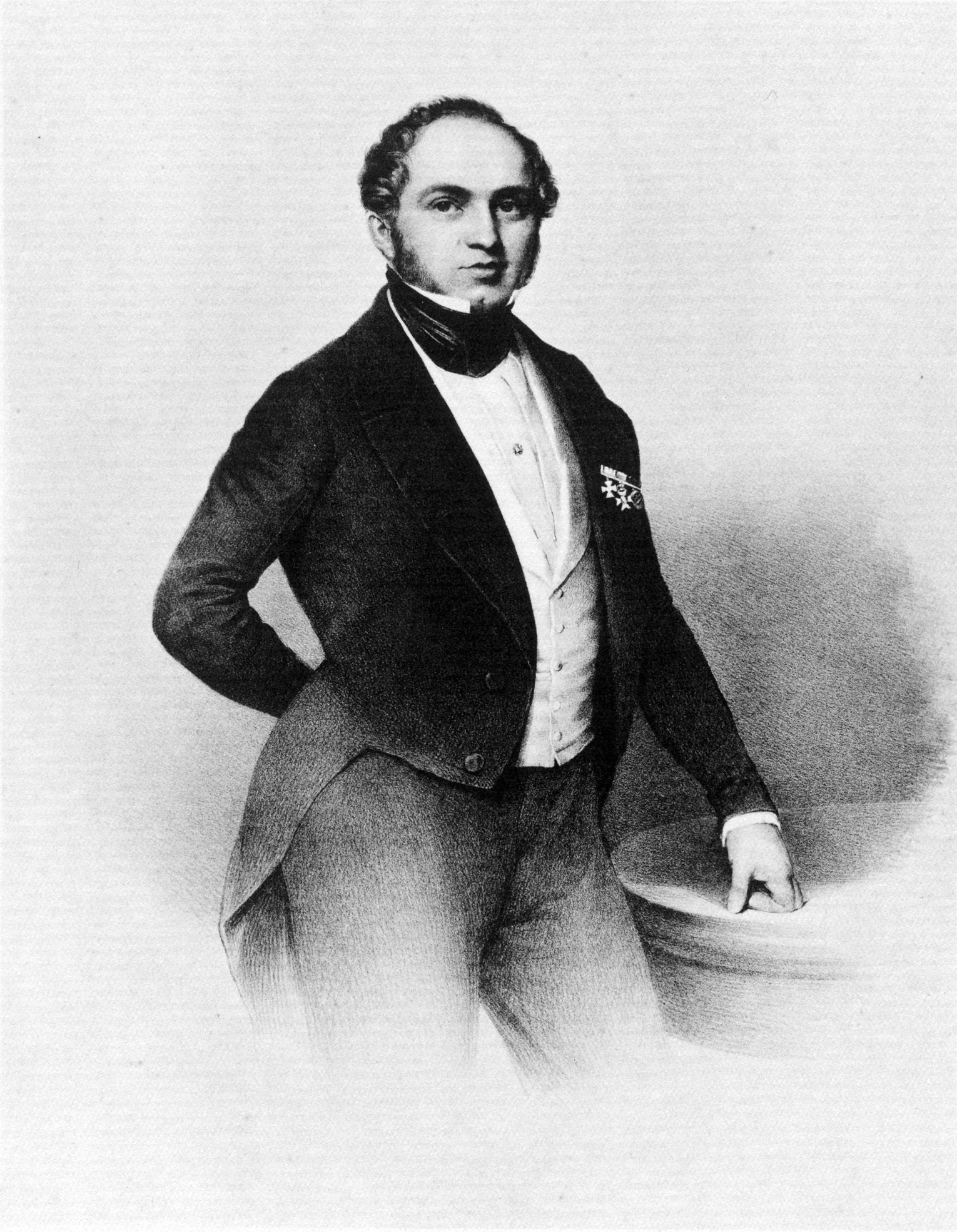 Wilhelm Hartmann (* 11. November 1808; † 29. September 1872), Direktor der Kammgarnspinnerei zu Leipzig